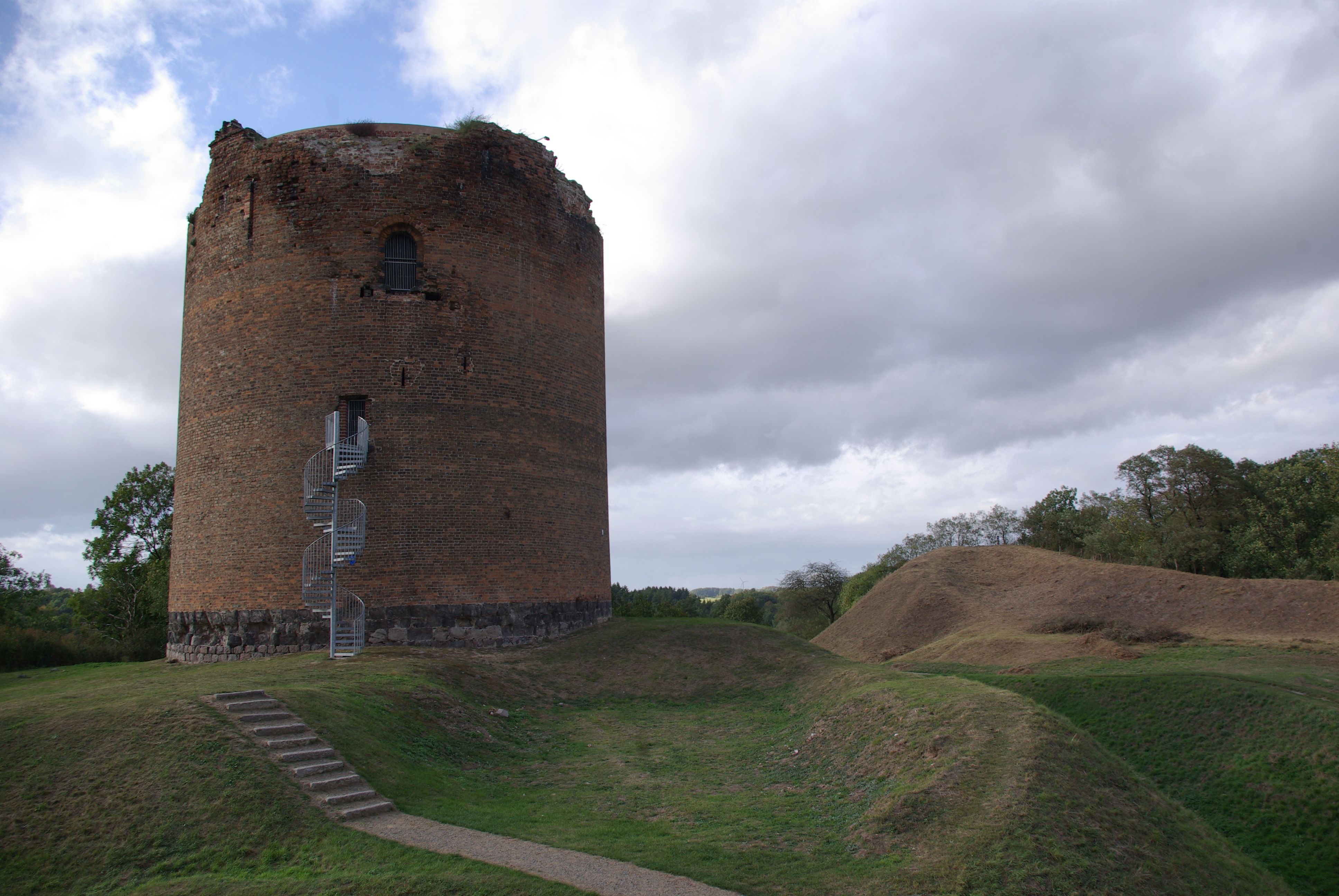 Angermünde Ortsteil Stolpe in Brandenburg. Der Bergfried der Burg Stolpe stammt aus dem 12. Jahrhundert und steht unter Denkmalschutz.